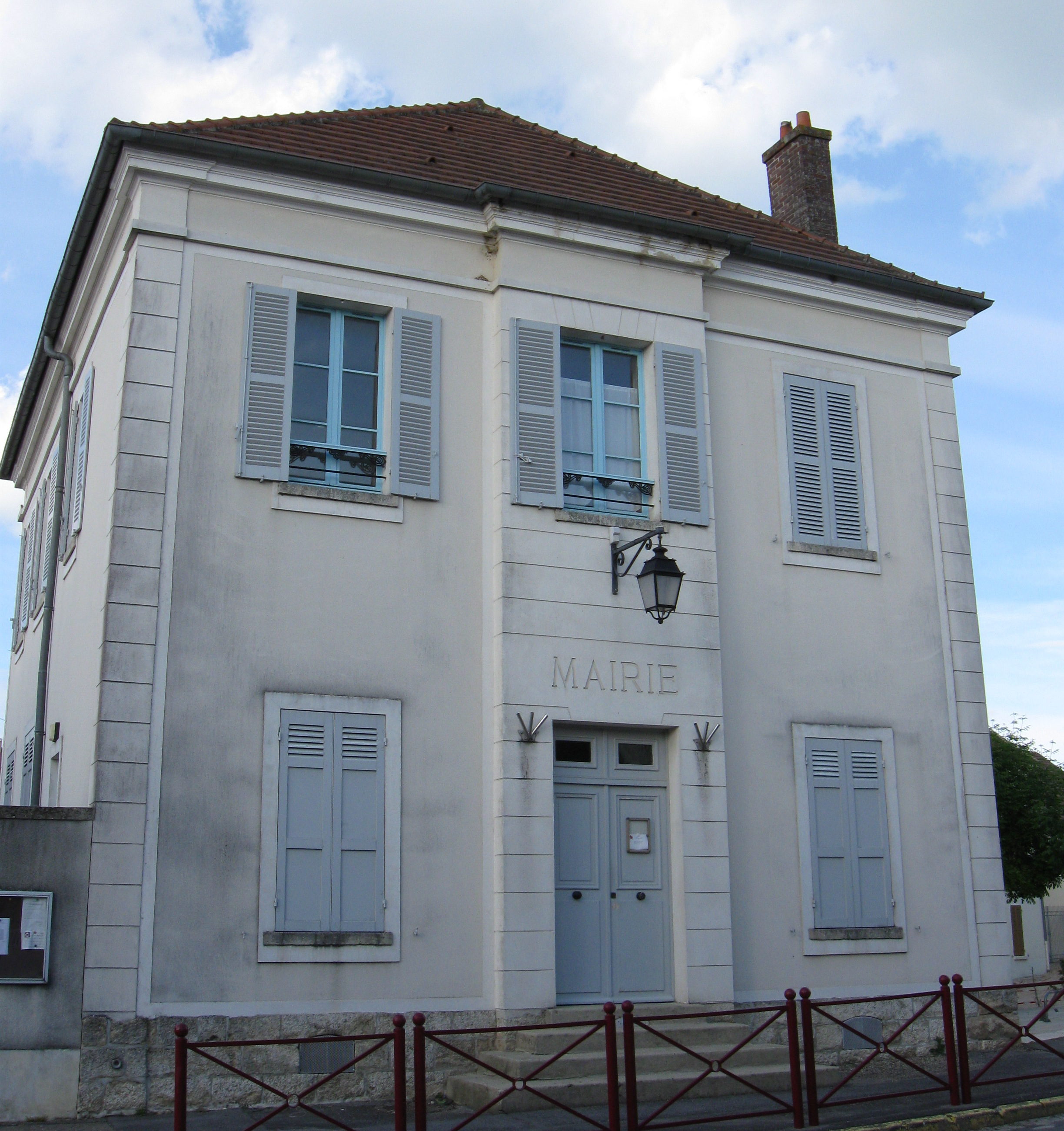 Mairie d'Ocquerre. (département de la Seine-et-Marne, région Île-de-France).